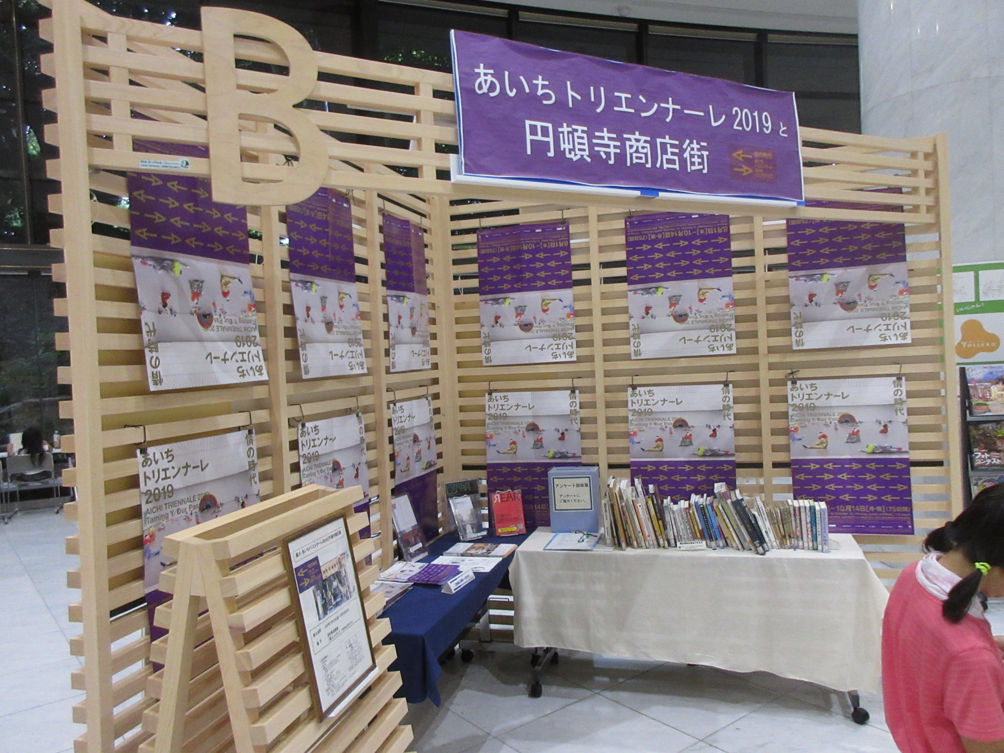 愛知県図書館の1階。「あいちトリエンナーレ2019」の開催にあわせて設置された特集コーナー。